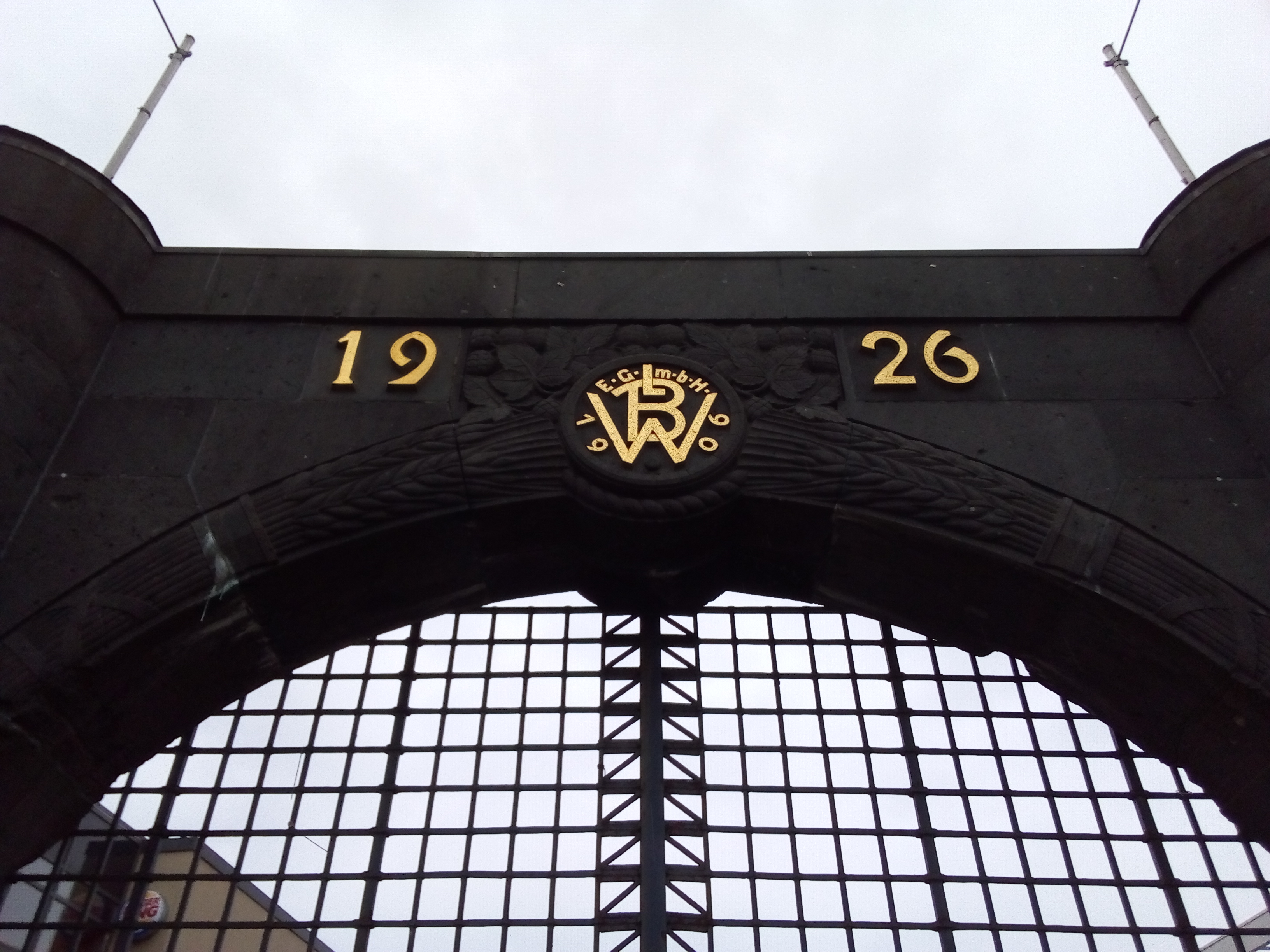 Torbogen der Lagerbier-Brauerei Wülfel in Hannover